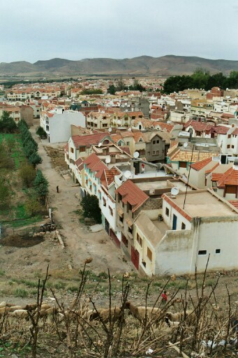 Licence: Autorisation accordée par:Webmaster:Catherine Billard- Auteur et droits sur cette photo :Copyright à Catherine Photo:Quartier Saada Azrou